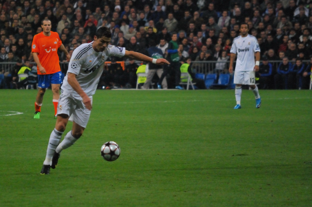 Real Madrid 1 - Zurich 0 Vuelve la Champions y vuelve...Ronaldo...que falta va haciendo